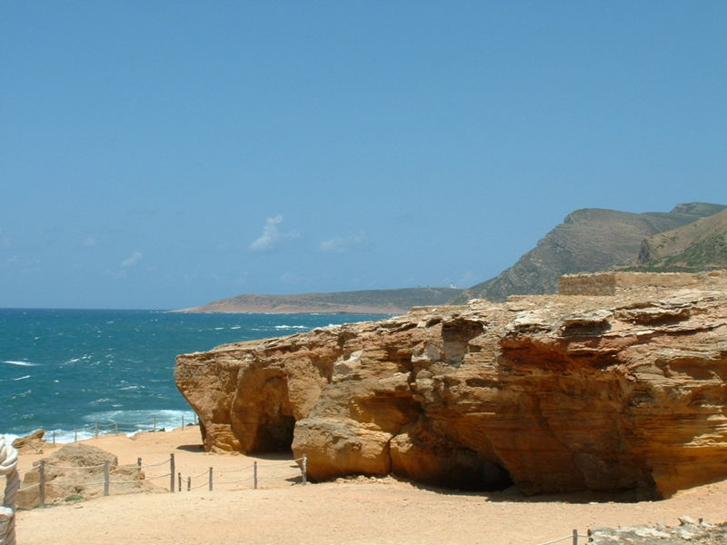 Photographie personnelle près de la ville d'El Haouaria, en Tunisie. Sur ce site se trouve les carrières dont étaient extraits les blocs de grès qui ont notamment servi à l'édification de Carthage. Les immenses cavernes souterraines qui la composaient sont appelées latomies.